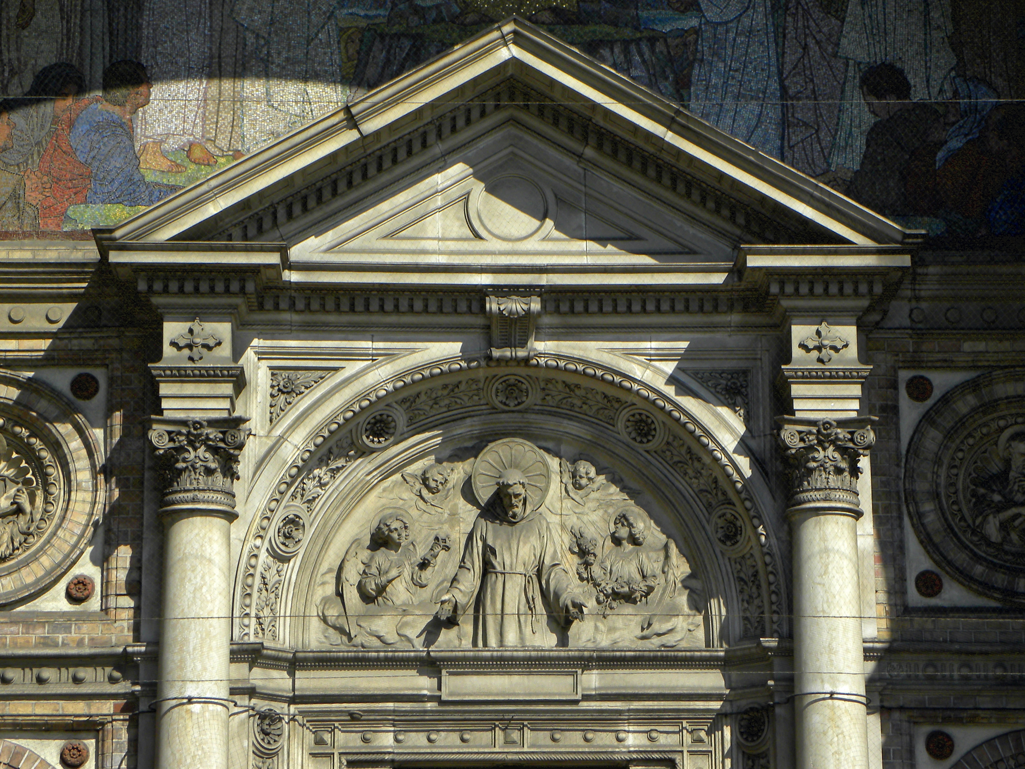 Kath. Pfarrkirche, Breitenfelder Pfarrkirche hl. Franziskus Seraphicus